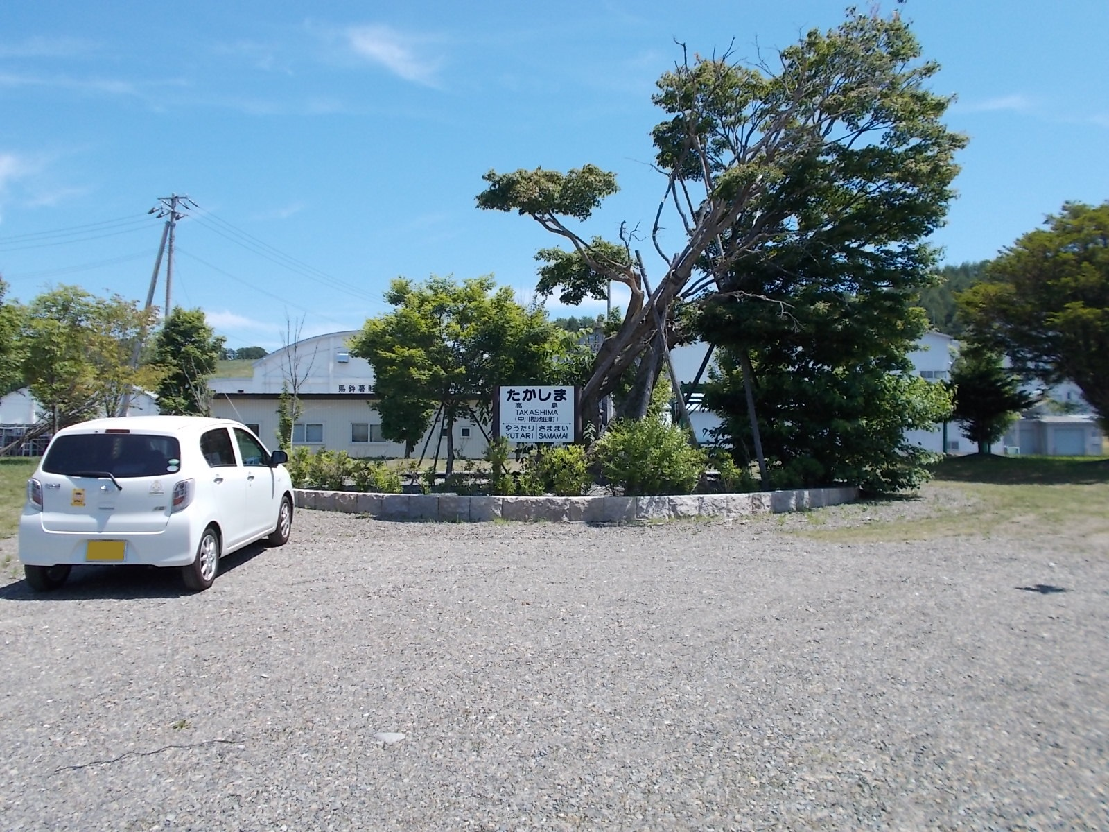 駅前正面より。国鉄仕様の駅名票がモニュメントとして設置されている。